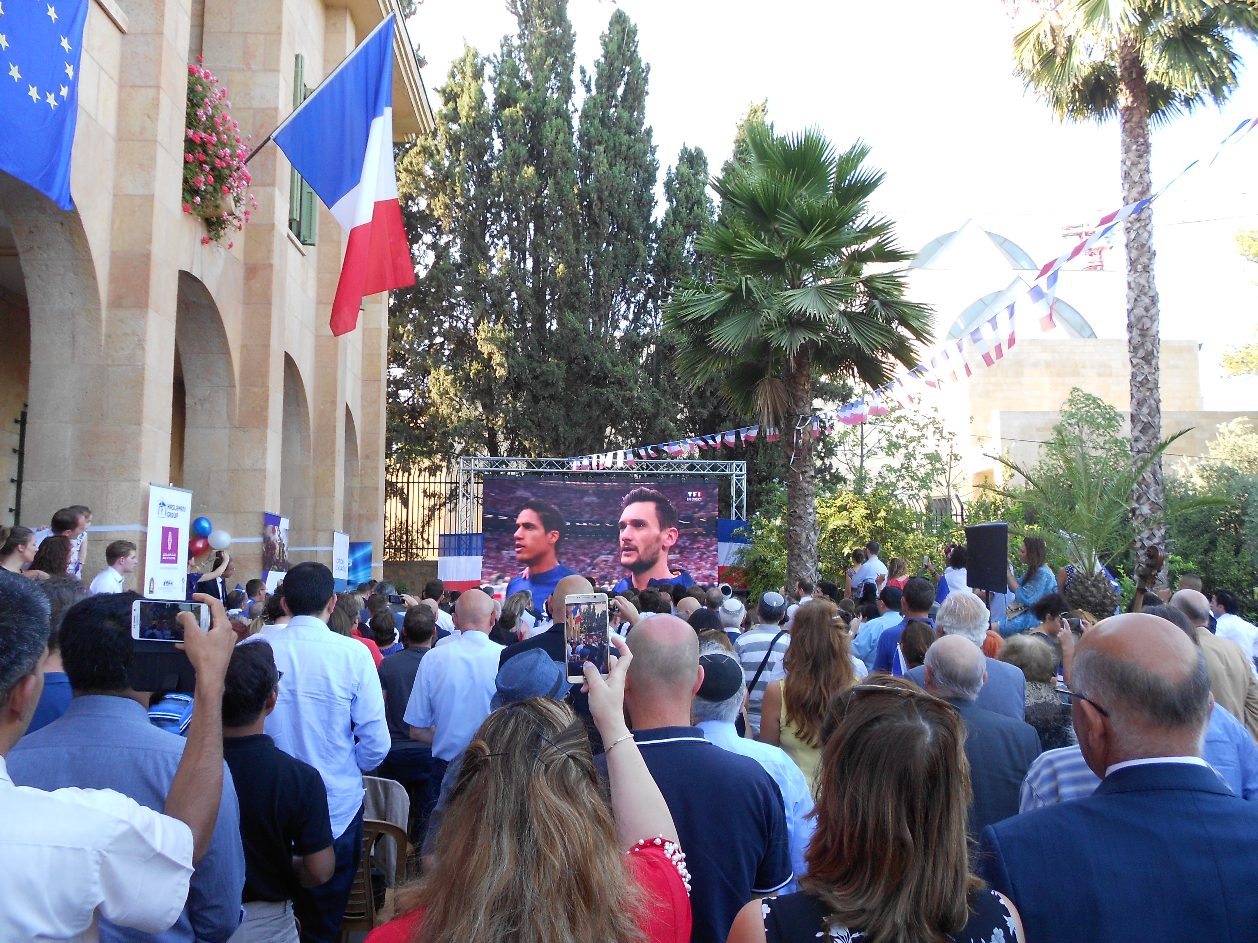 Finale de la Coupe du Monde 2018 retransmise au Consulat de France à Jérusalem le 15 juillet 2018